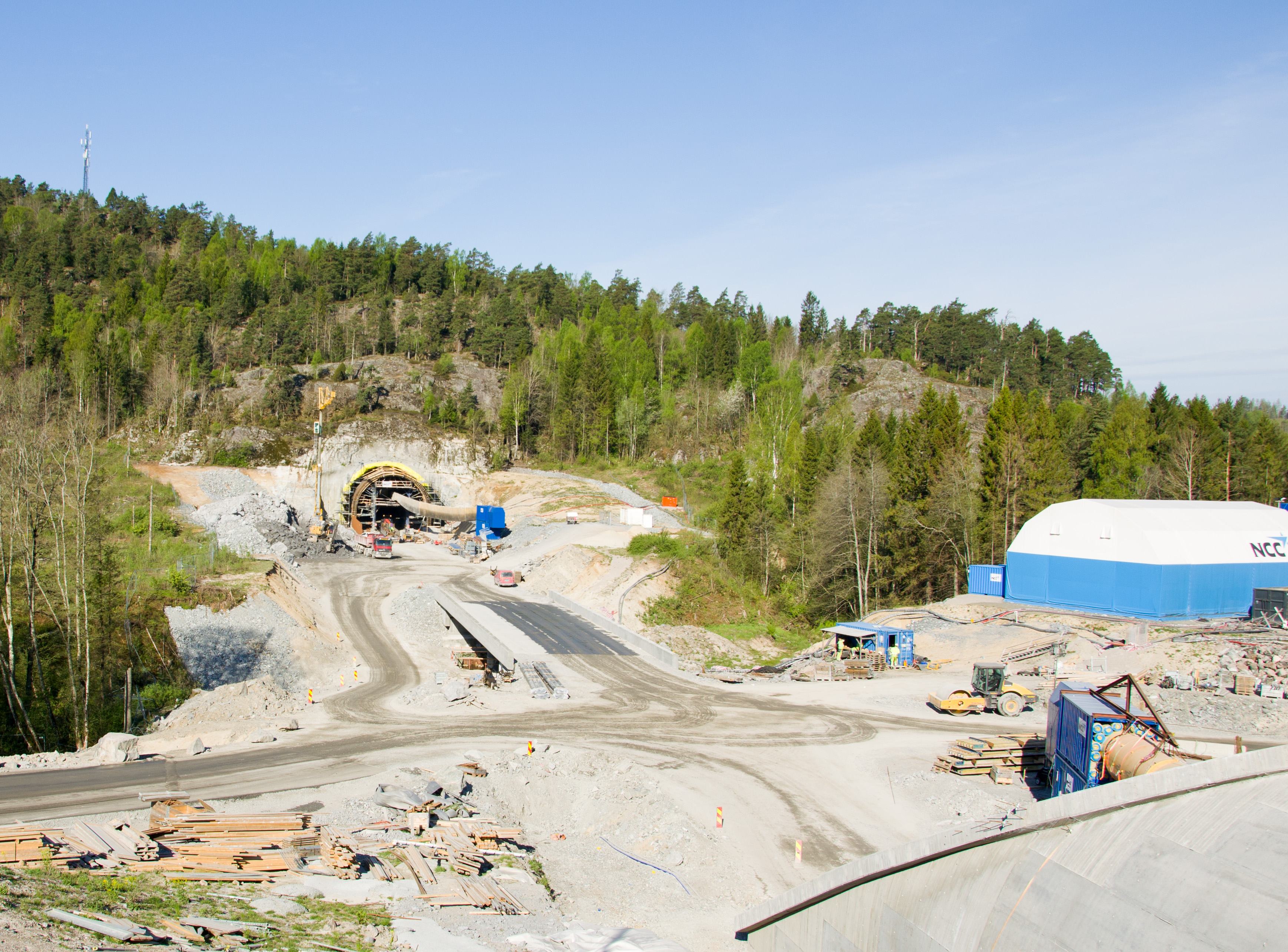 Eidangertunnelens østre innslag, april 2014. Porsgrunn, Telemark, Norge